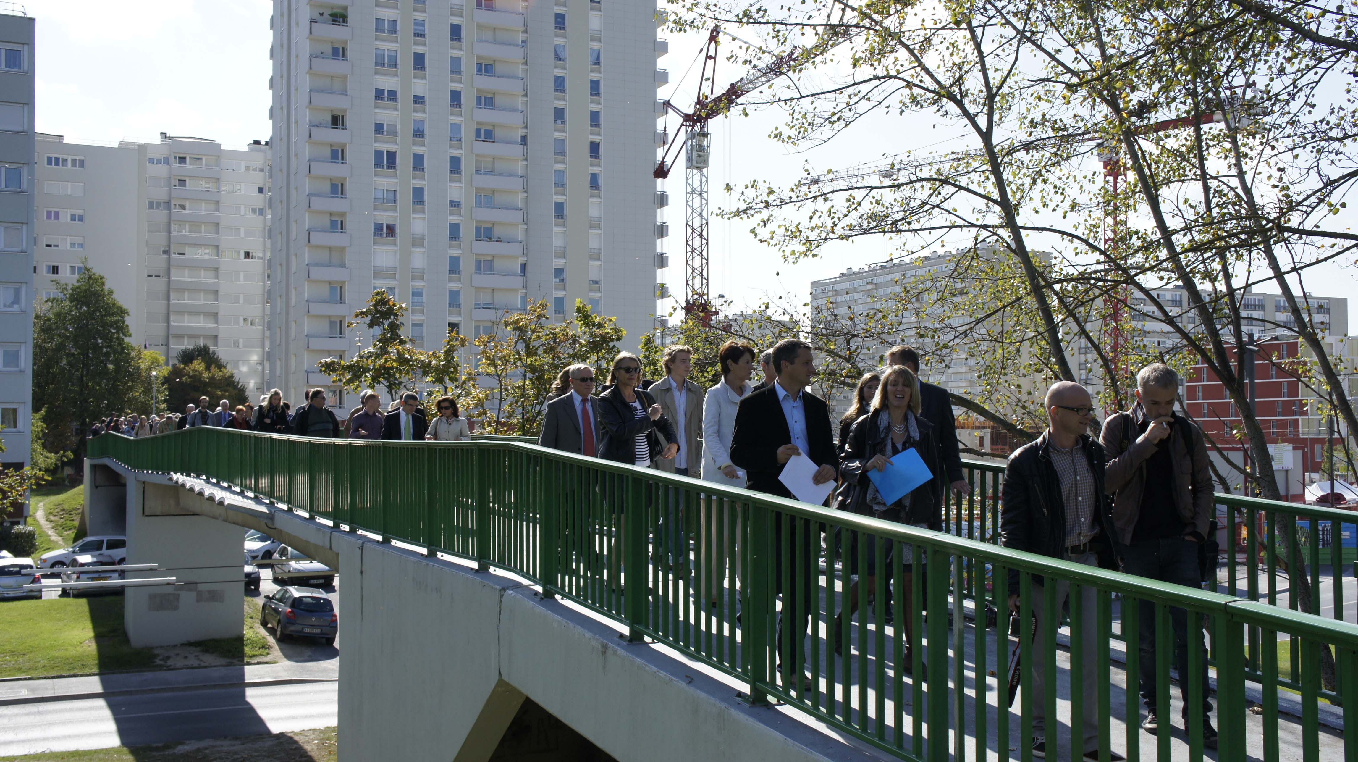 Vue, depuis le parc st-John Perse des tours devant la faculté de Reims.